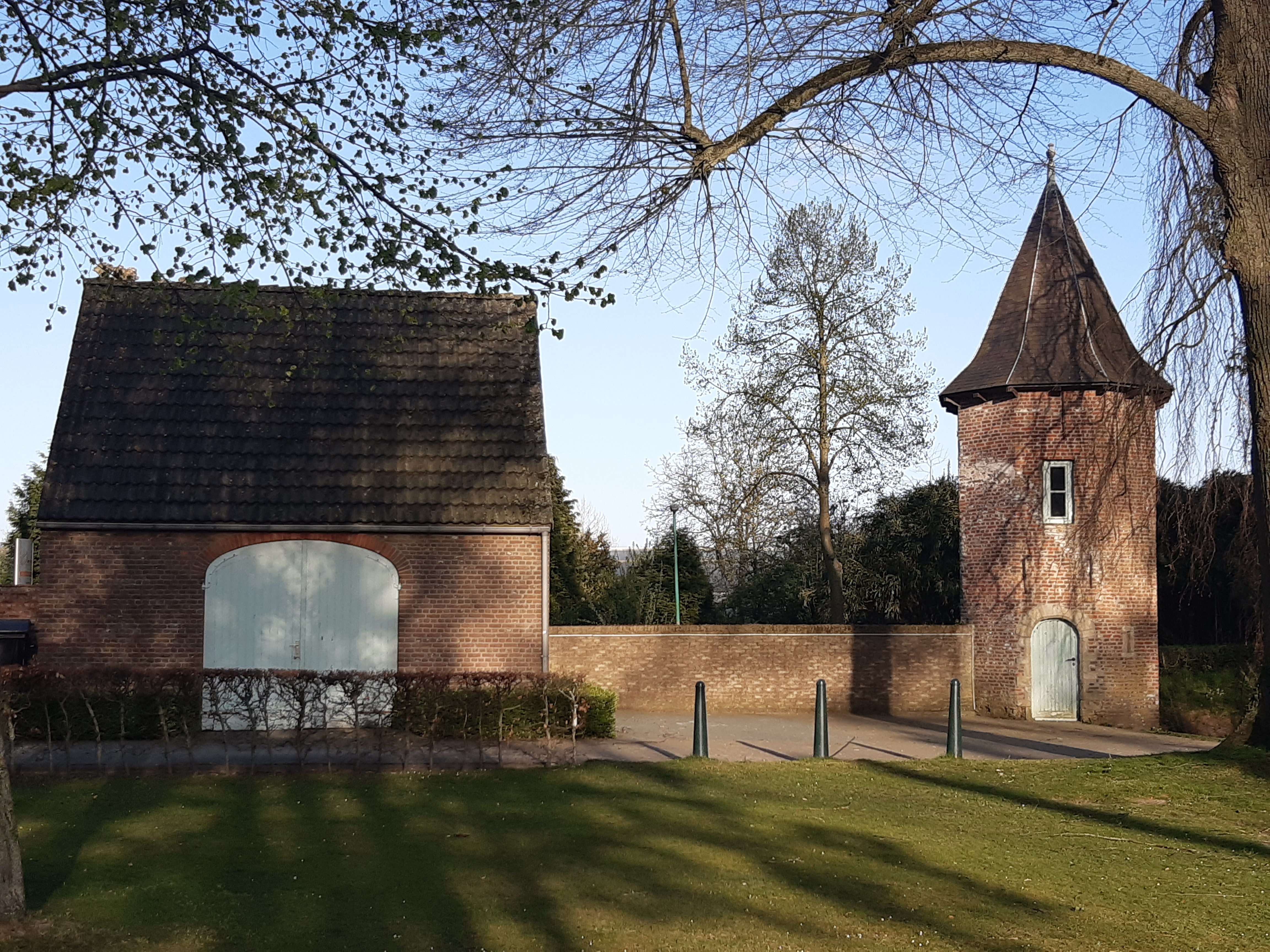 Spaans torentje en schuur (21e eeuw)